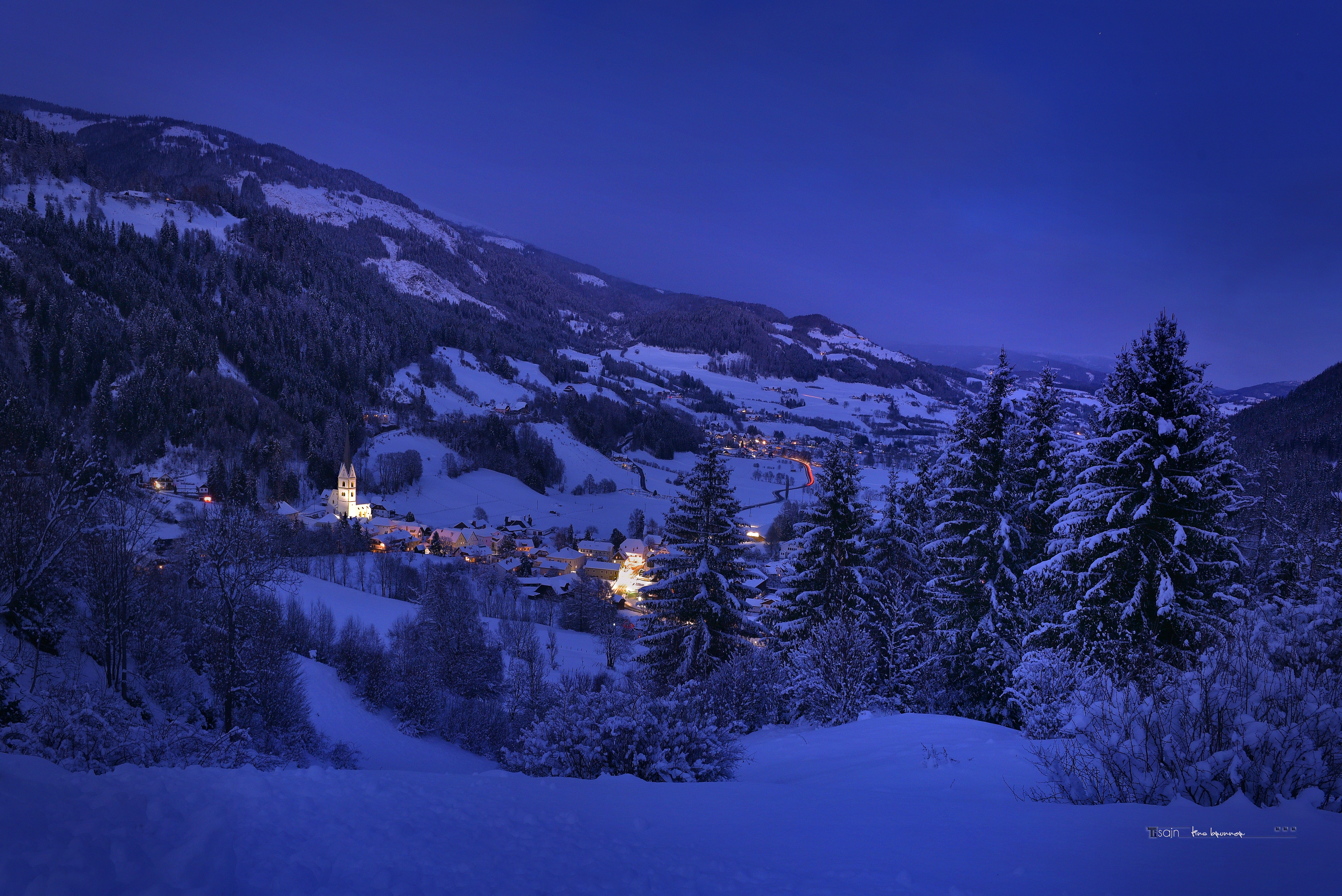 Ansicht des Ortskerns von Schöder, Steiermark mit Blick Richtung Katschtal und den Ortsteil Baierdorf